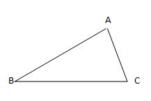 नेपाली: विषमबाहु त्रिभुज